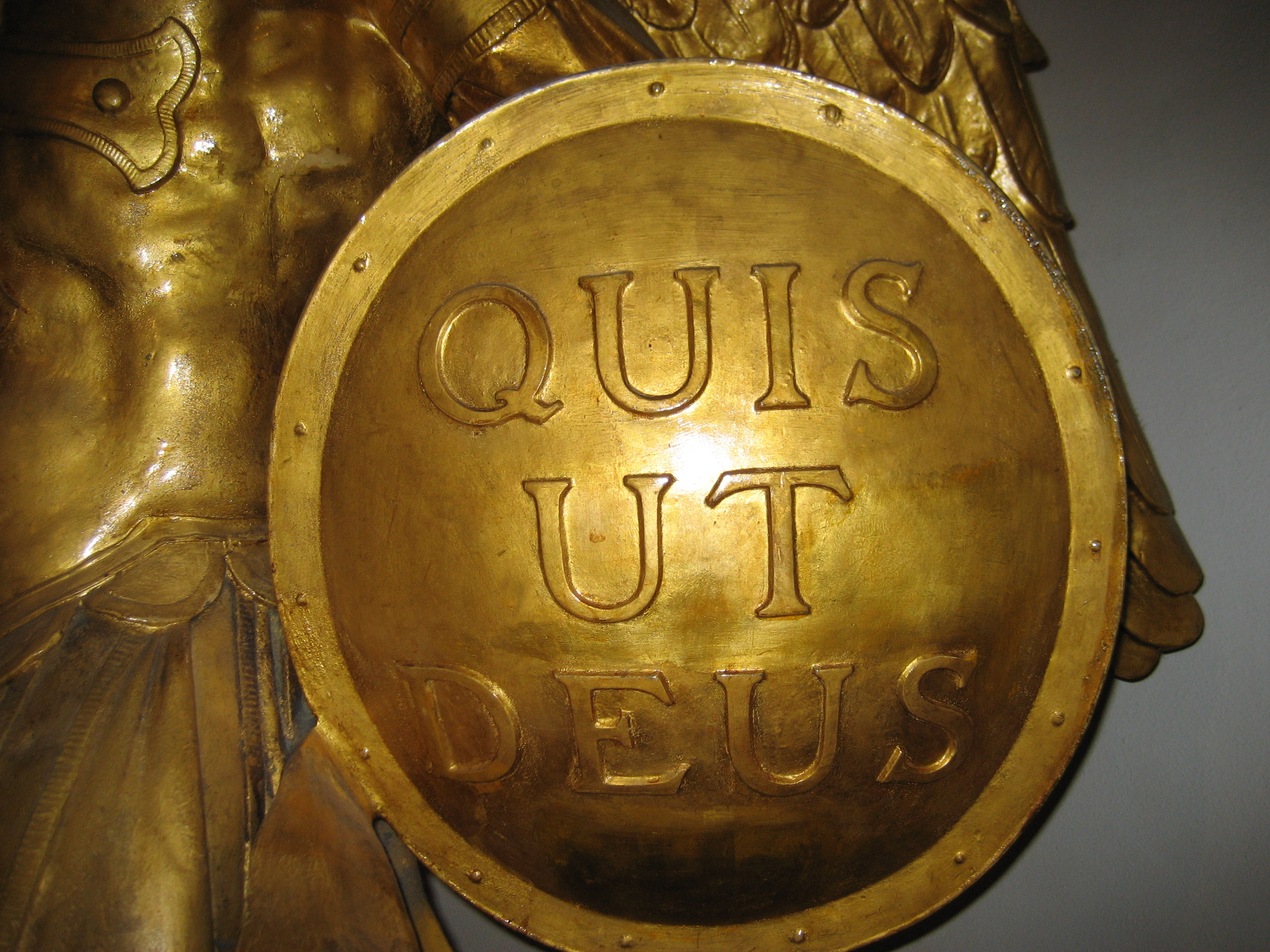 Statue des Erzengels Michael in der 1. Etage des Kurfürstlichen Schlosses Bonn. Vergoldeter Bleiguss. Wurde von Wilhelm Rottermondt geschaffen. Hier ein Detail: Der Schild.